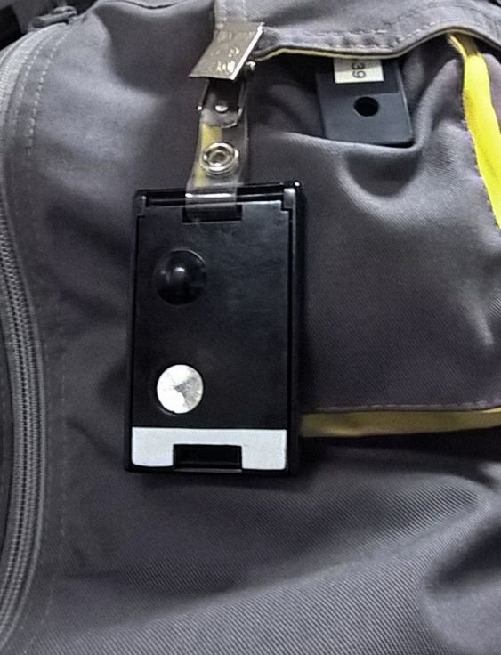 Термолюмінісцентний дозиметр НARSHAW